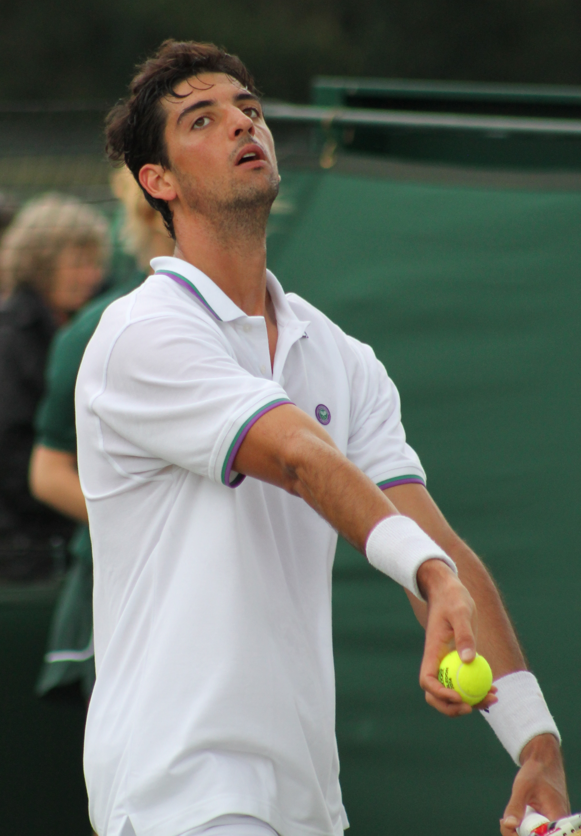 Bellucci WMQ14 (10)